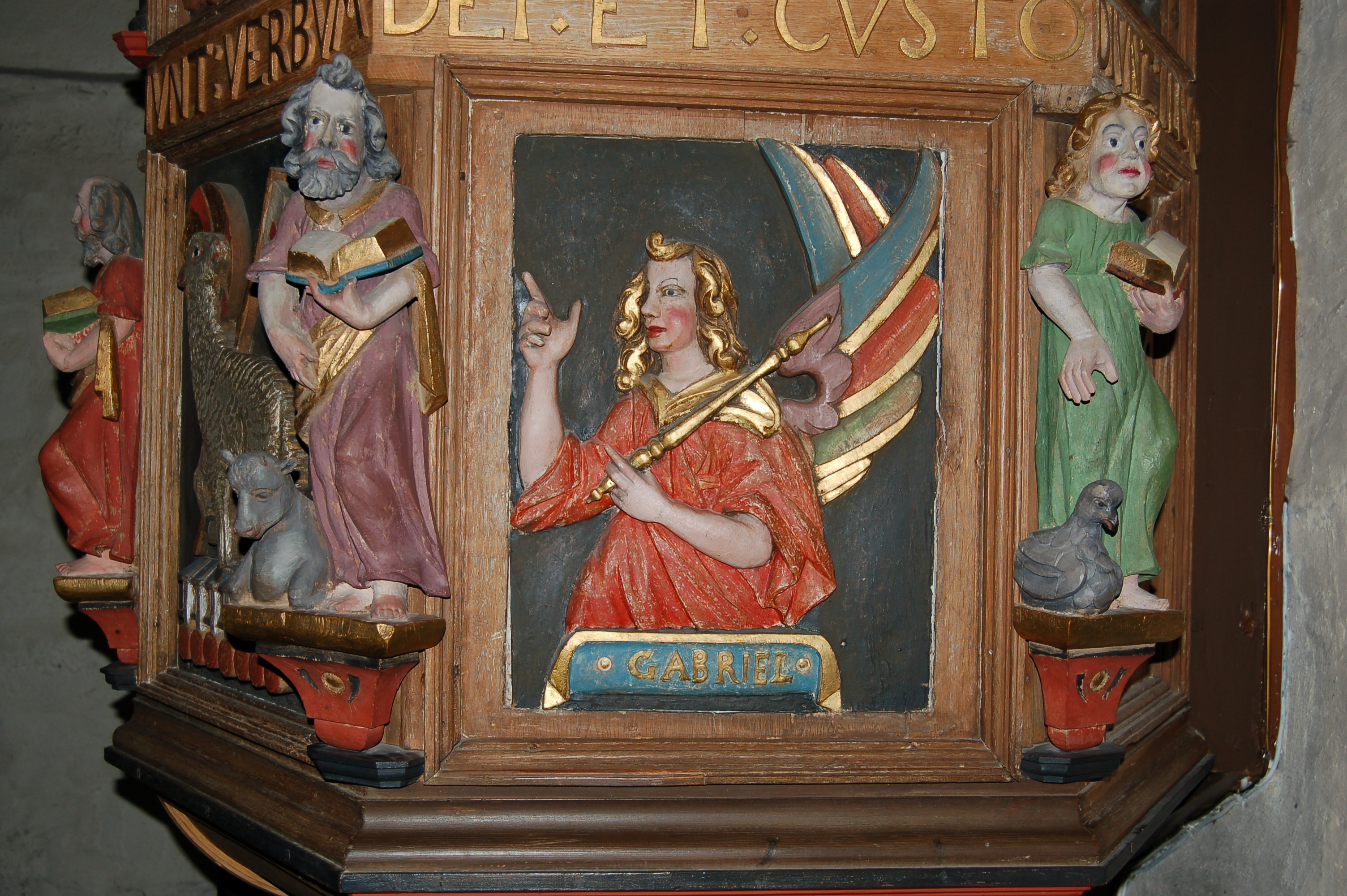 Engelen Gabriel på prekestolen i Alstadhaug kirke i Skogn. Det ble i 1646 bestilt "4 billeder til Prædiche stoellen" fra Johan Bilthugger, så det antas at det er han som er kunstneren